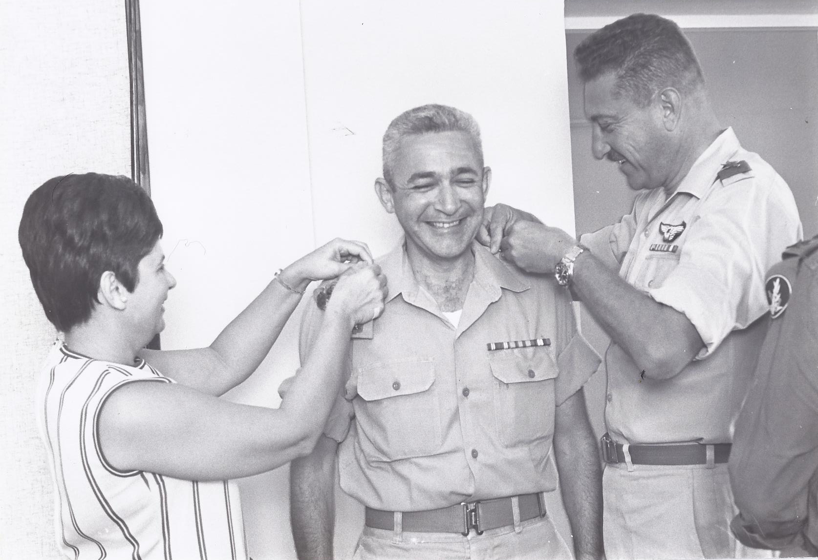 יוסף כלב מקבל דרגת אל"מ